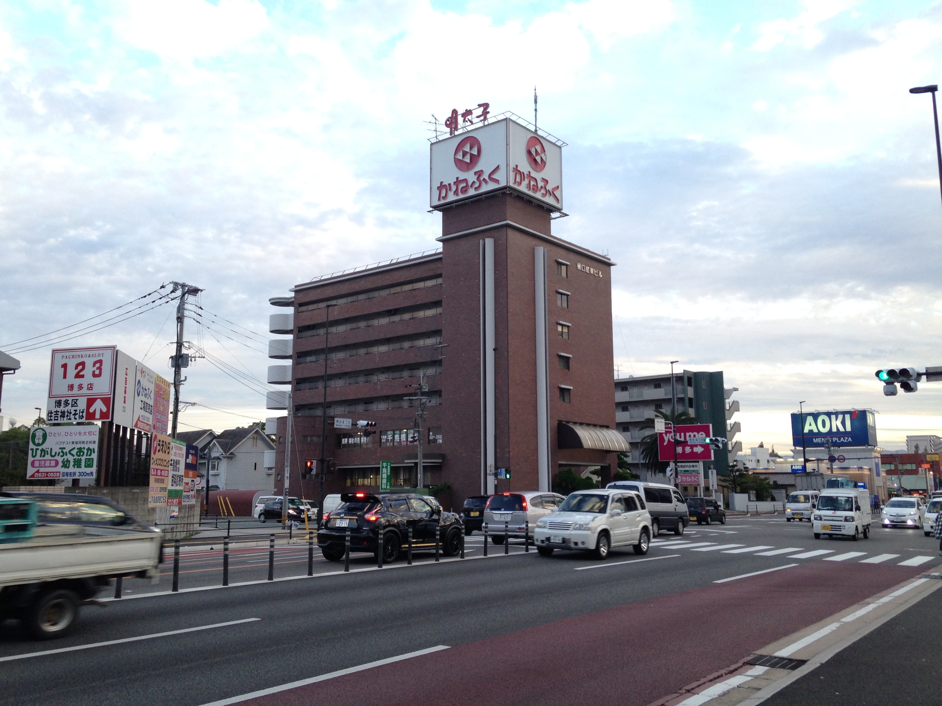 かねふく本社が入居する樋口産業ビル